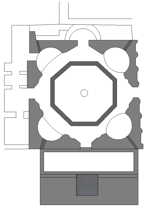 Pianta del Santuario di Santa Maria della Rotonda ad Albano (RM) Versione png di File:Santuario Rotonda Albano.JPG